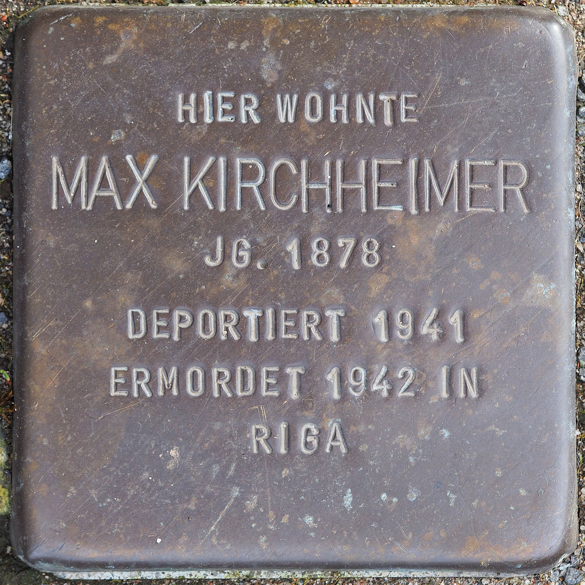 Stolpersteine MG: Kirchheimer, Max